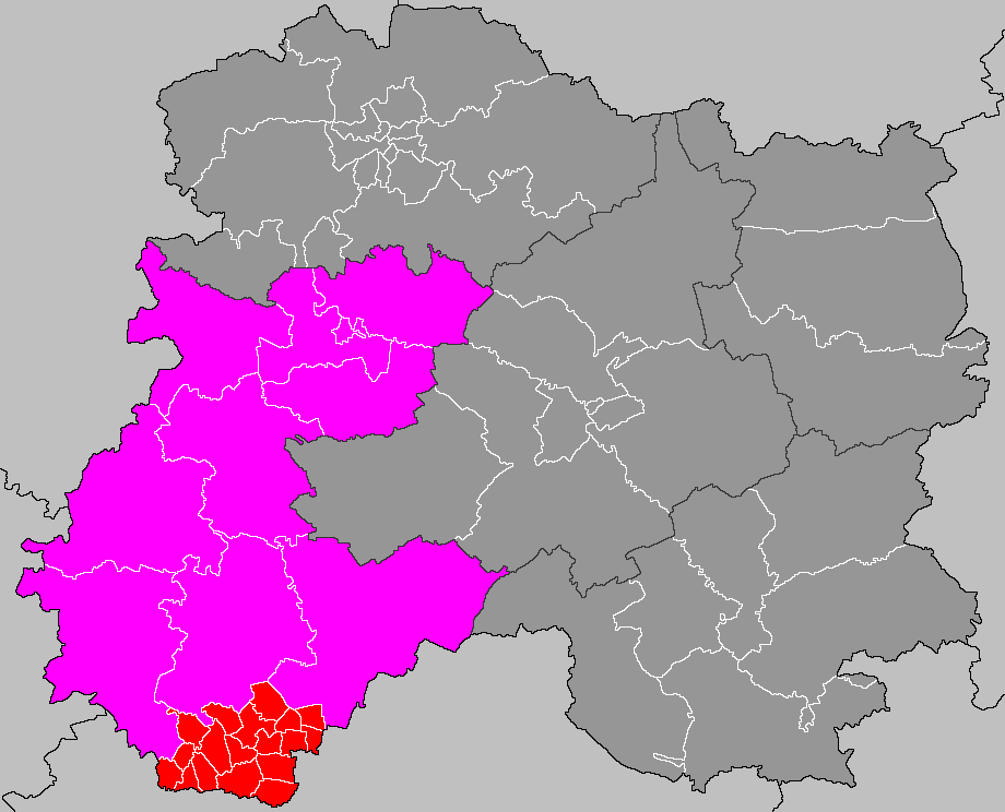 Localisation du canton d'Anglure.